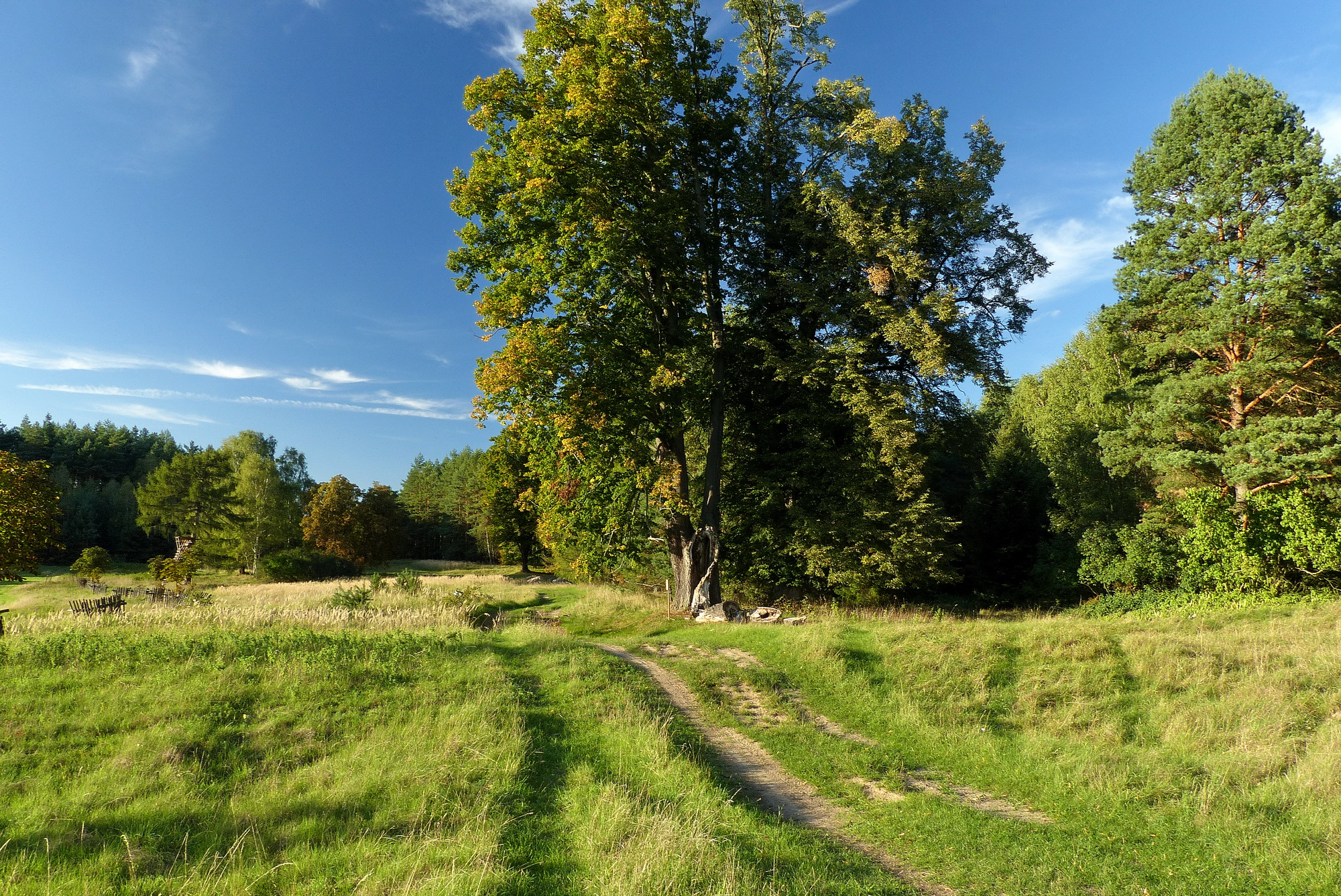 Bývalá Nová Hospoda – tankodrom